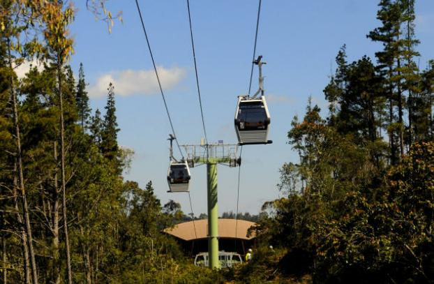 Reserva natural ecológica en Medellín, Colombia